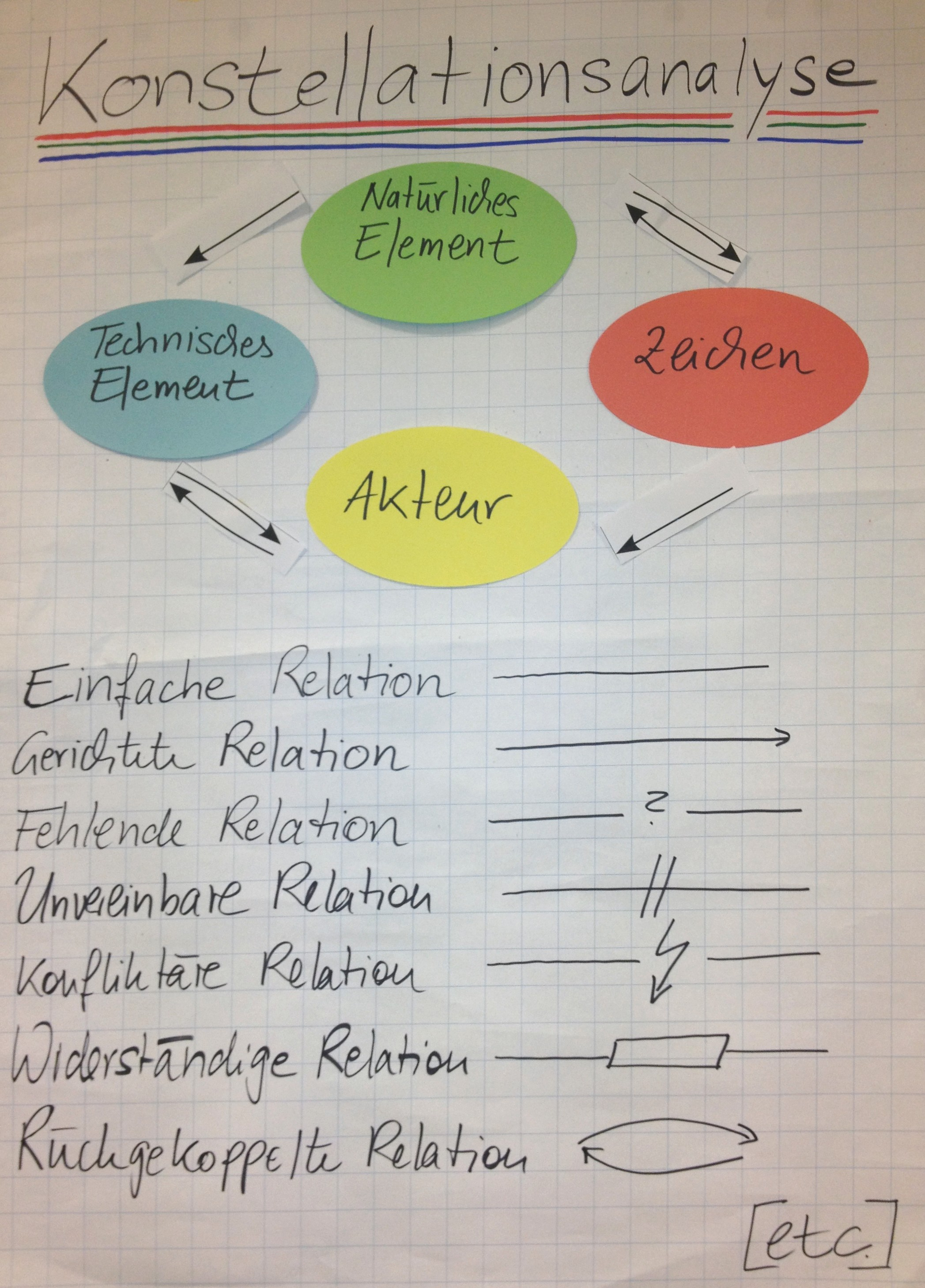 Elemente einer Konstellationsanalyse. Veranstaltung: Nachdenkstatt 2013.